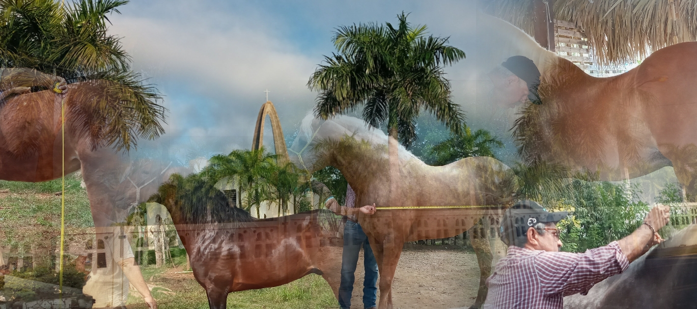 Representación gráfica de proceso de zoomatria de Caballos Higueyanos